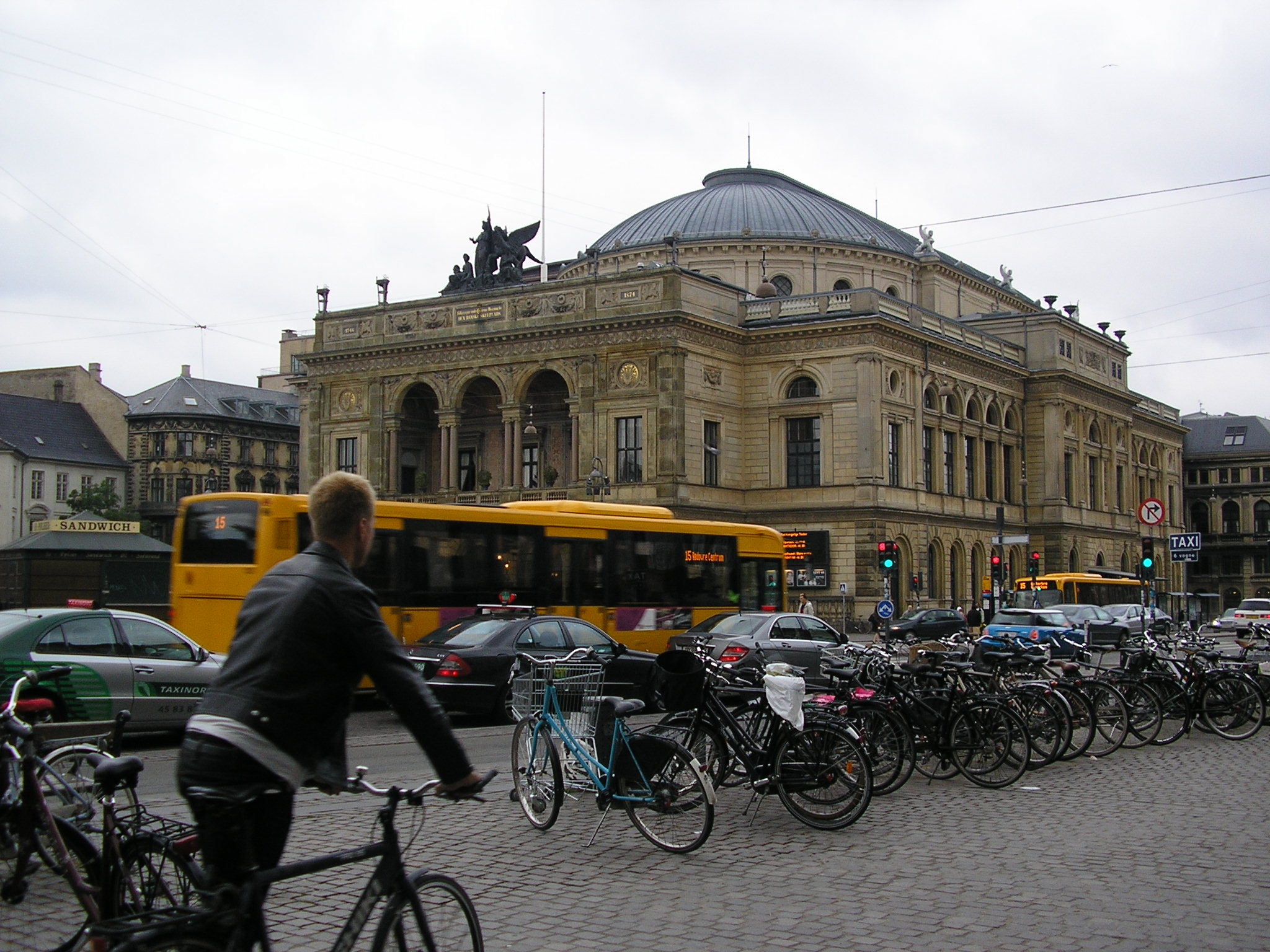 Royal Danish Theatre in Copenhagen